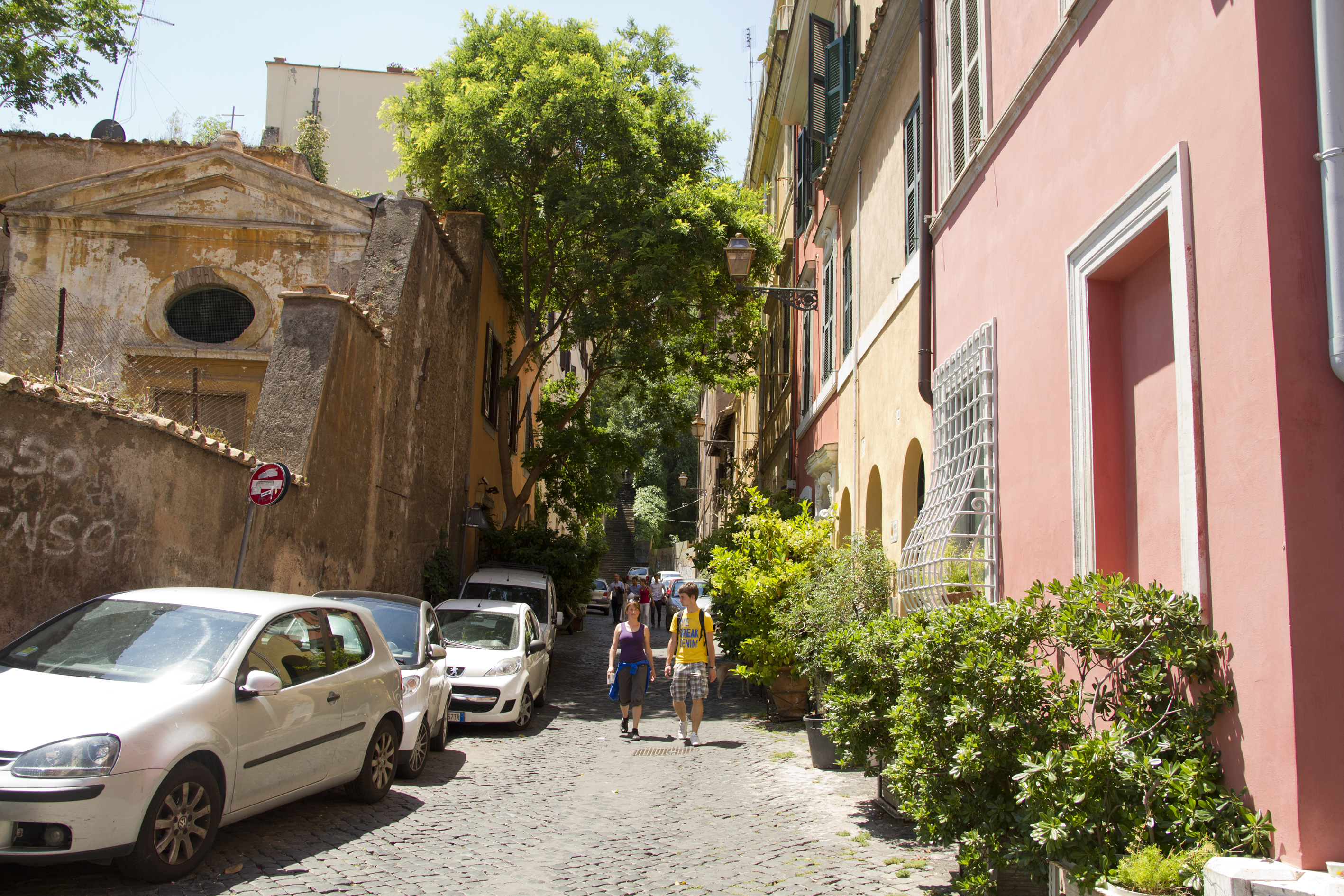 Vicolo del Cedro, Trastevere, Rome, Lazio, Italy